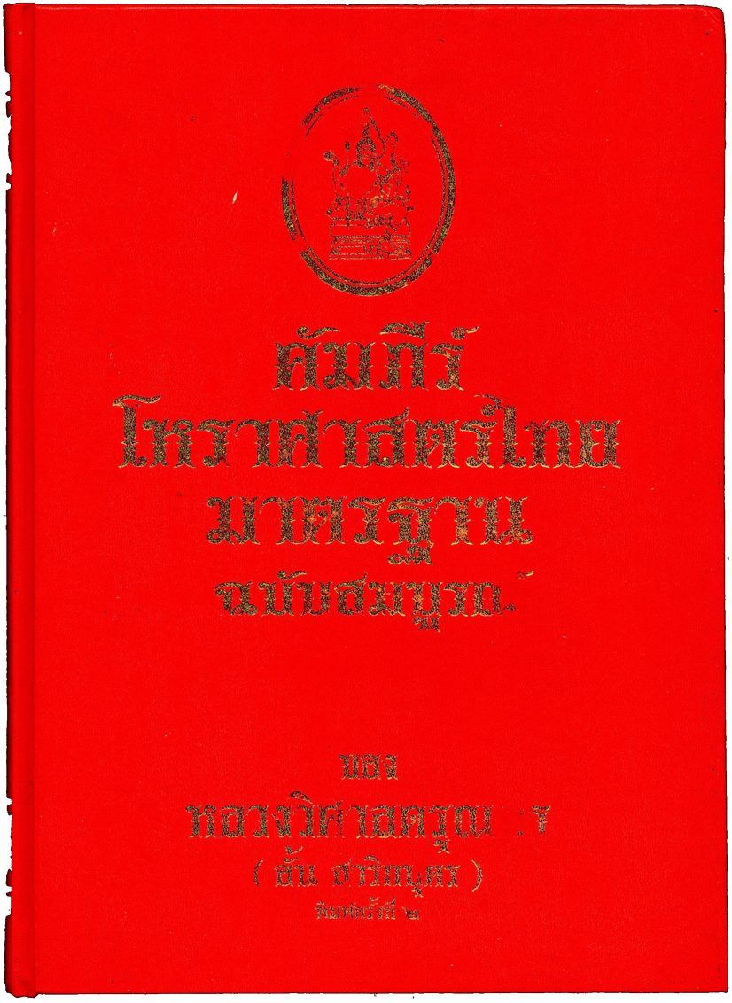 คัมภีร์โหราศาสตร์ไทย ฉบับ หลวงวิศาลดรุณกร (อั้น สาริกบุตร)